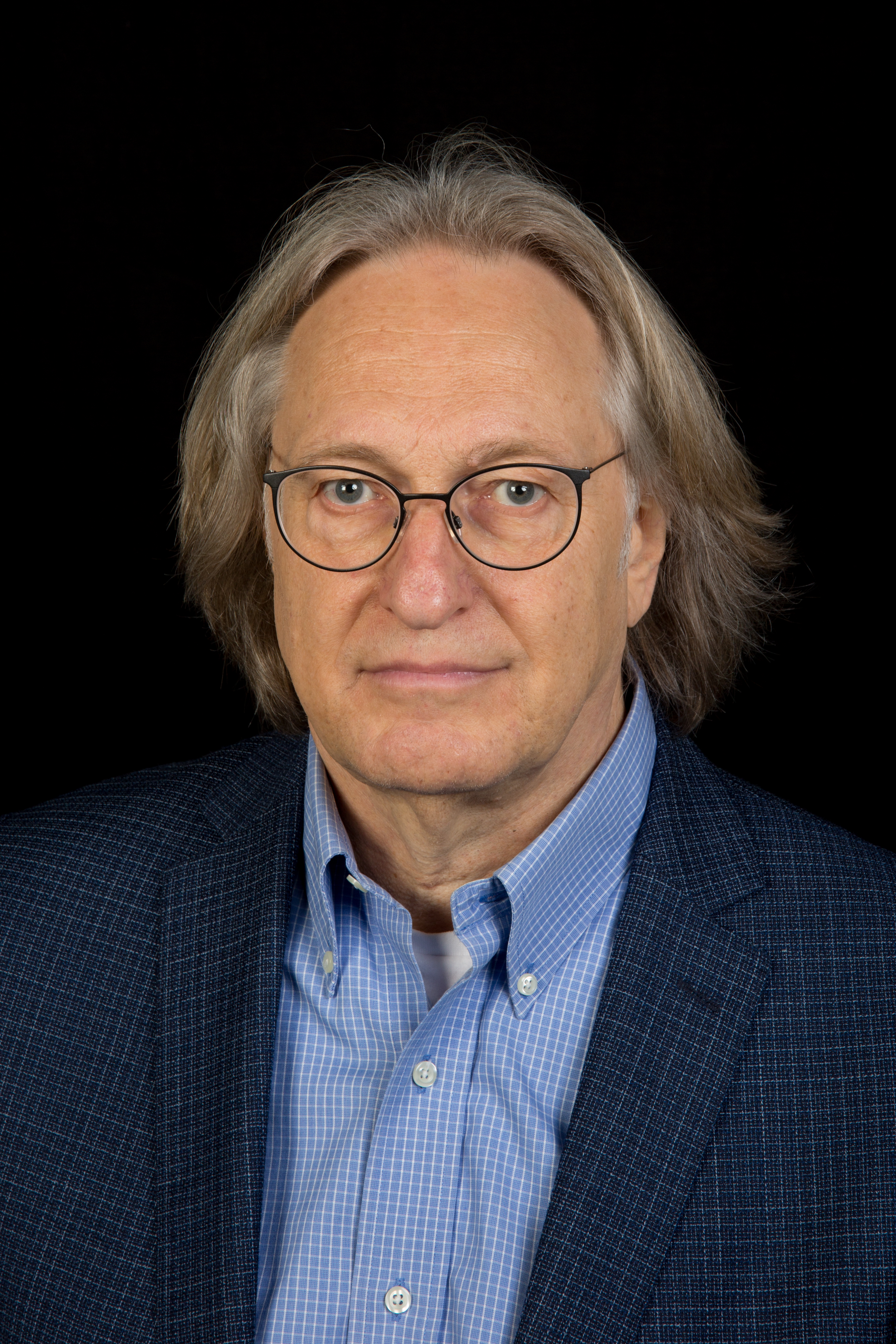 Der Psychonanlytiker und Verleger Hans-Jürgen Wirth bei der Frankfurter Buchmesse 2017